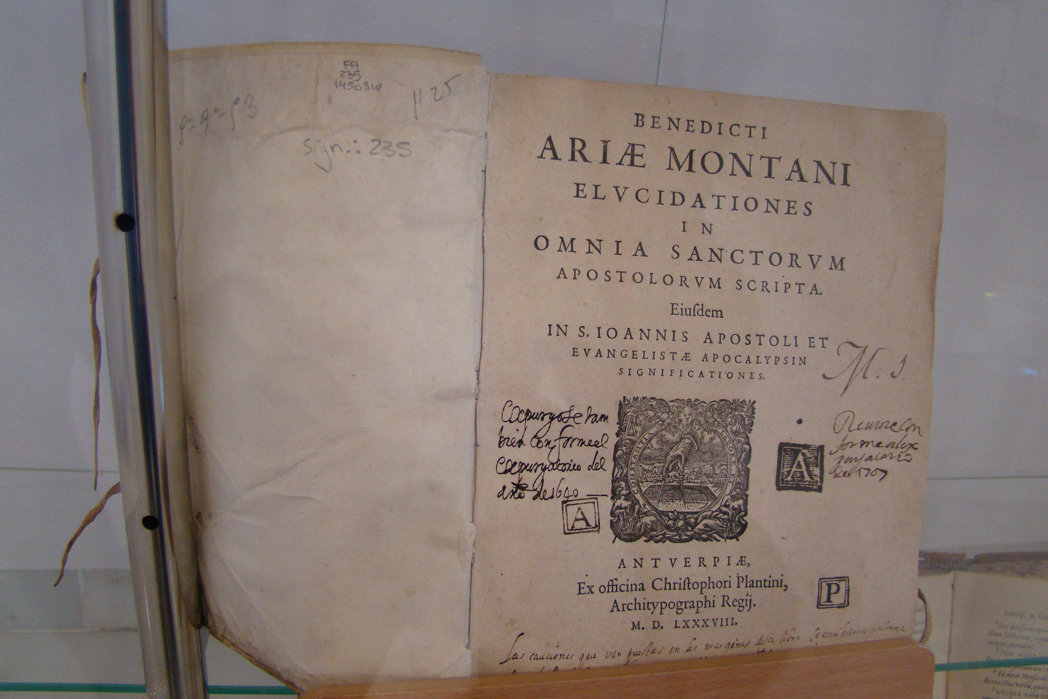 Benito Arias Montano, Elucidationes in omnia sanctorum apostolorum scripta